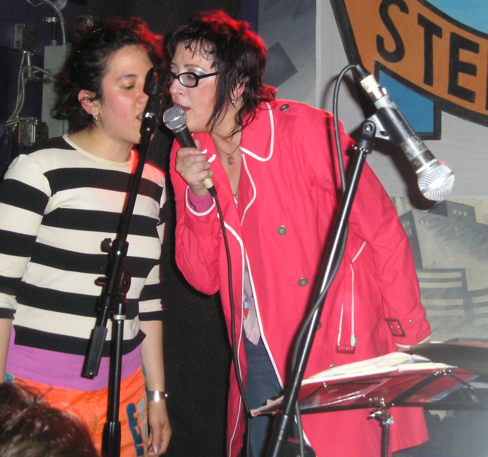 Françoise Cactus in a duet for Stereo Total @ Salòn Covadonga, 2005